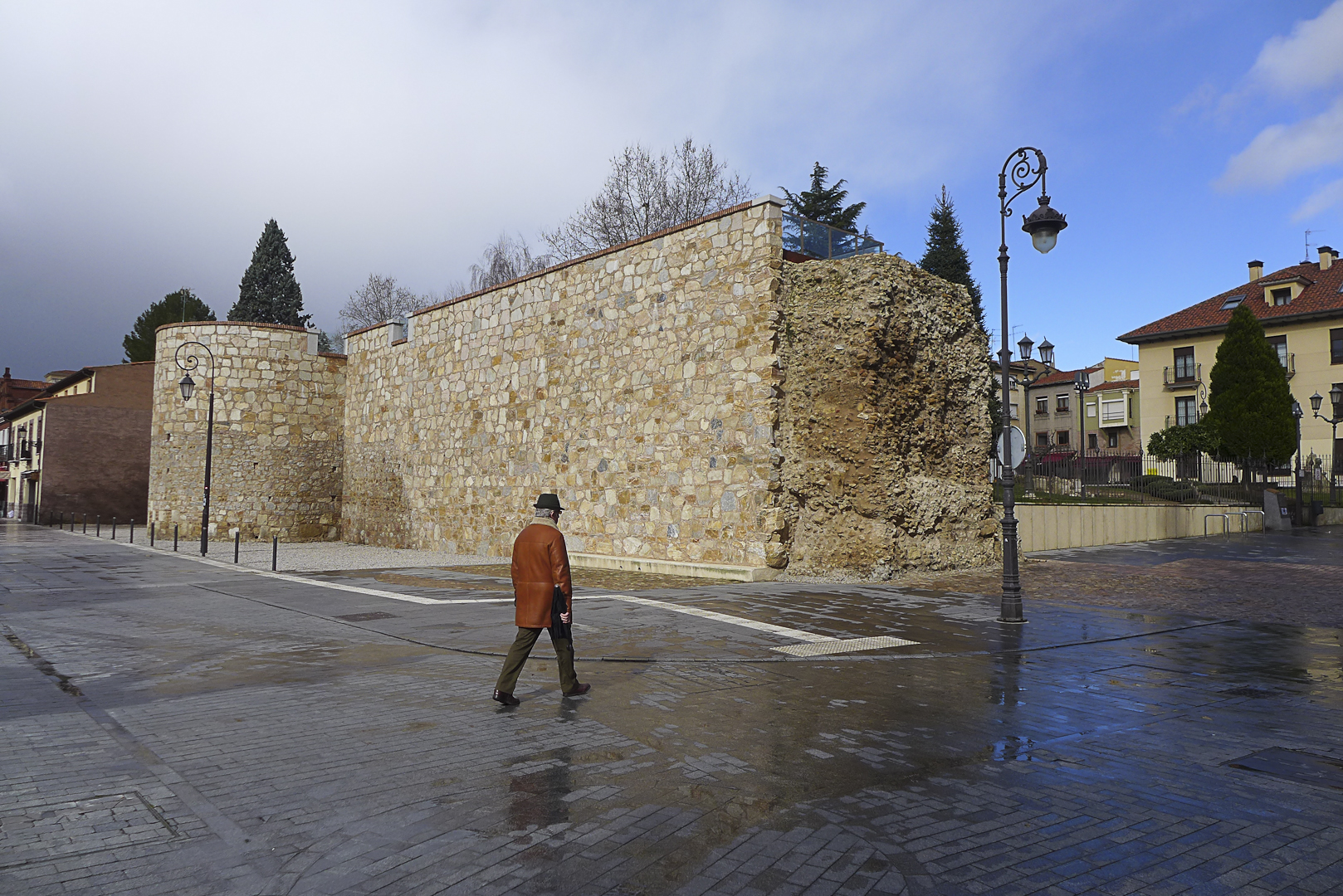 Spain-León-P1170136